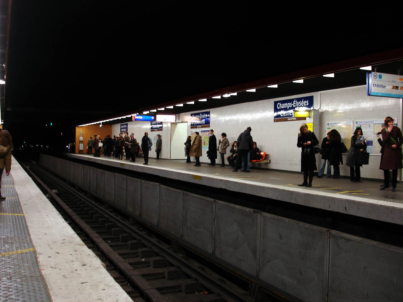 Métro de Paris (France) - ligne 13 - Station Champs-Elysées - Clemenceau